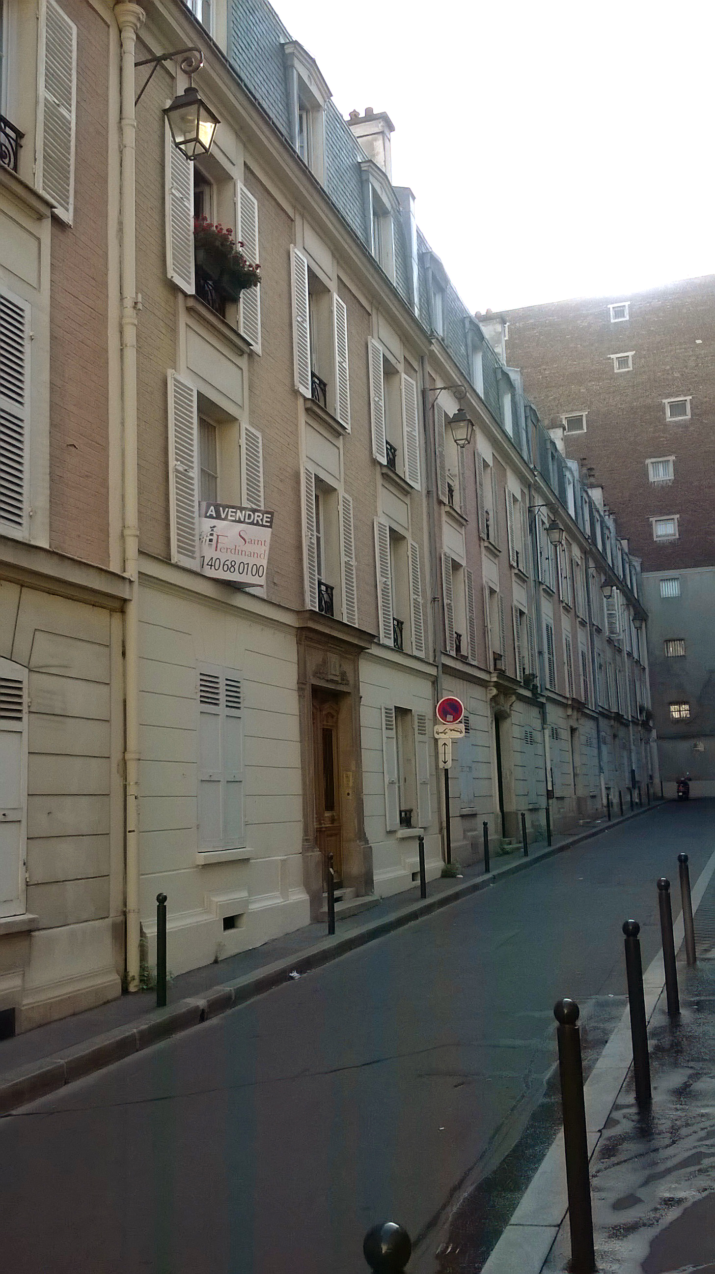 cité Ferembach, paris XVII ème arrondissement